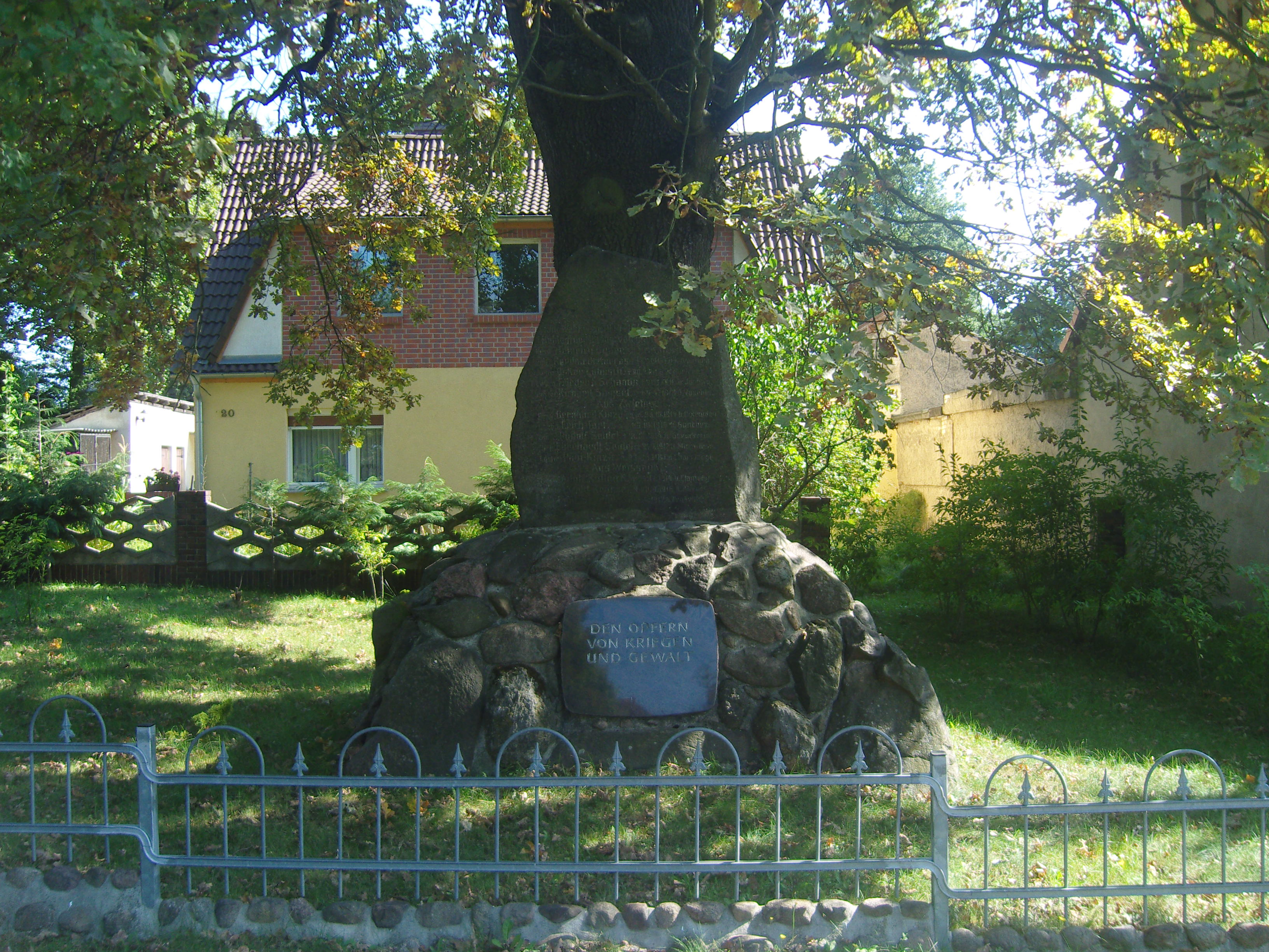 Kriegerdenkmal für die Gefallenen des Ersten Weltkriegs in Weißag, direkt an der Ortsgrenze zu Zwietow; Luckaitztal